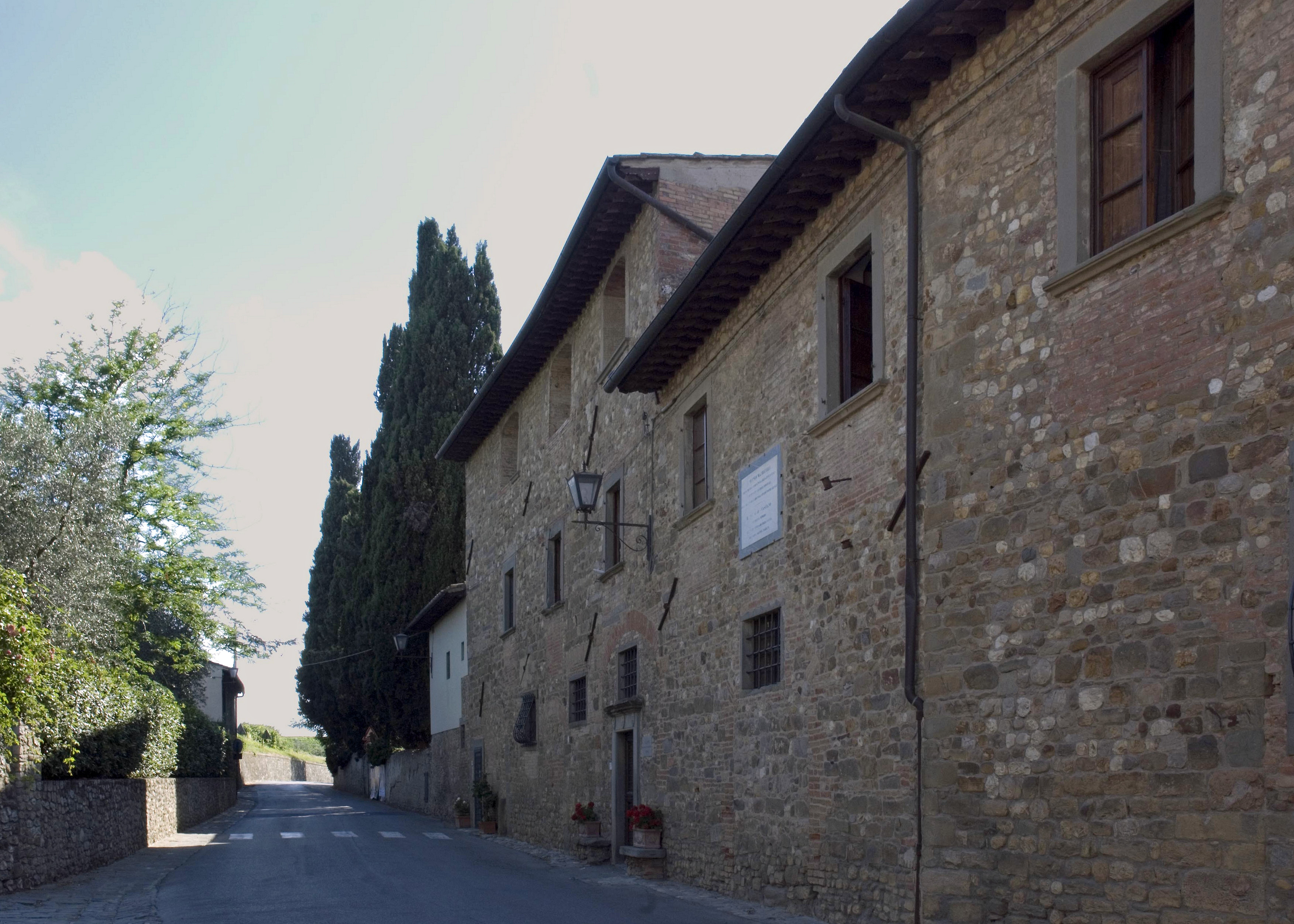 Casa di Niccolò Machiavelli (l'Albergaccio) a San Casciano in val di Pesa.